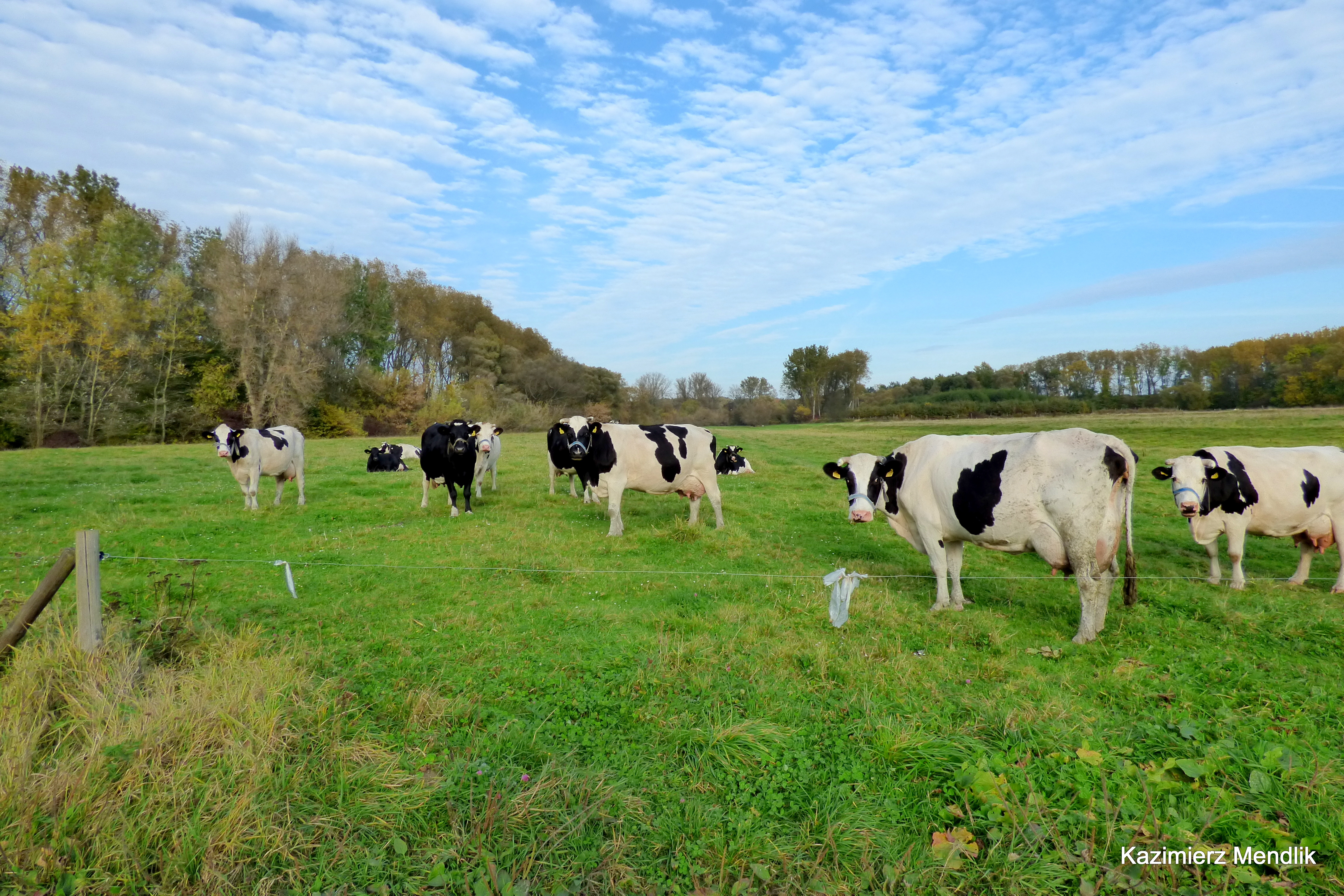 Mała Kępa - Posesja 11i jej okolica. Bardzo zadbane stadko krów na pastwisku przy posesji.